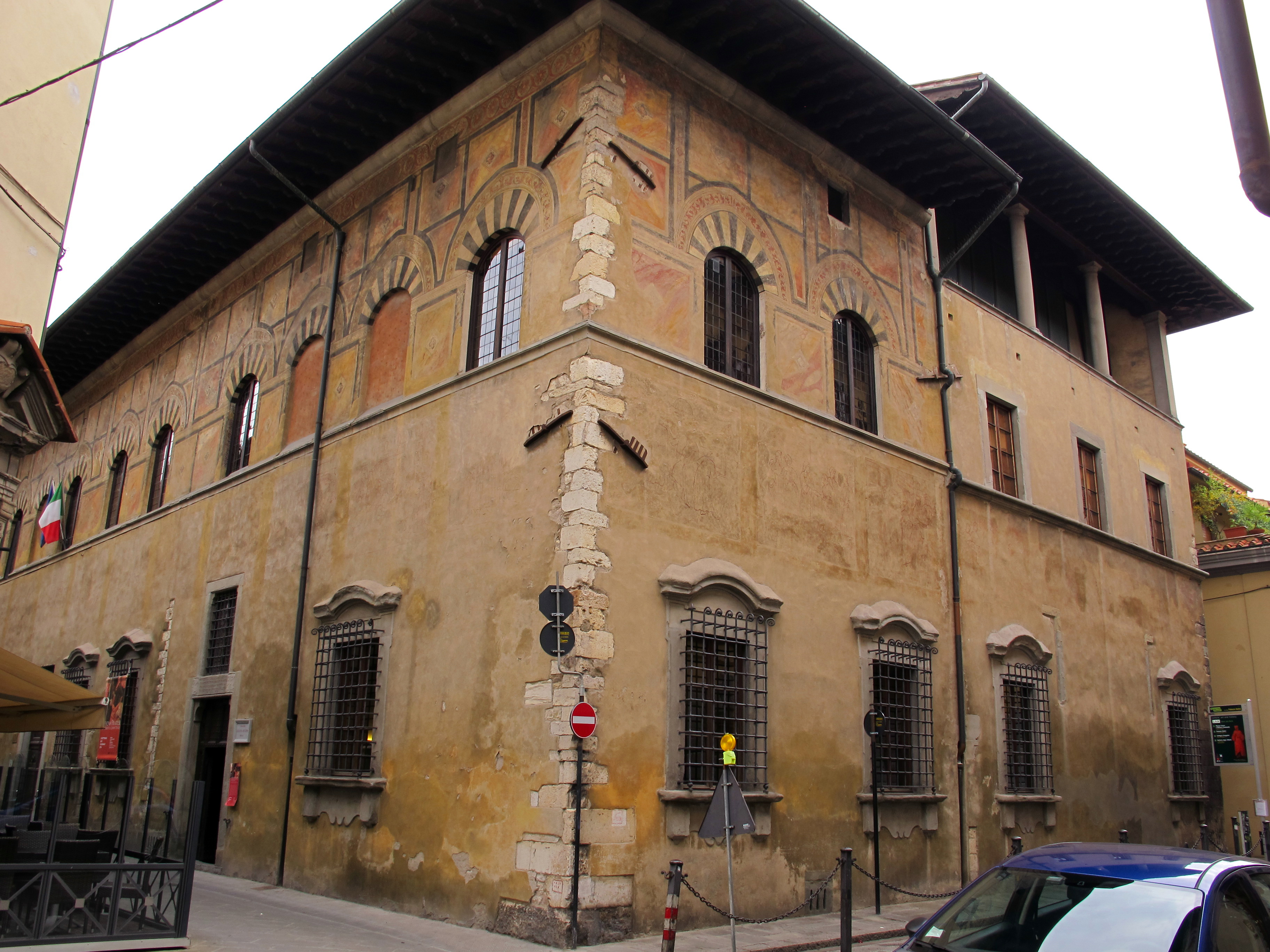 Palazzo Datini, Prato